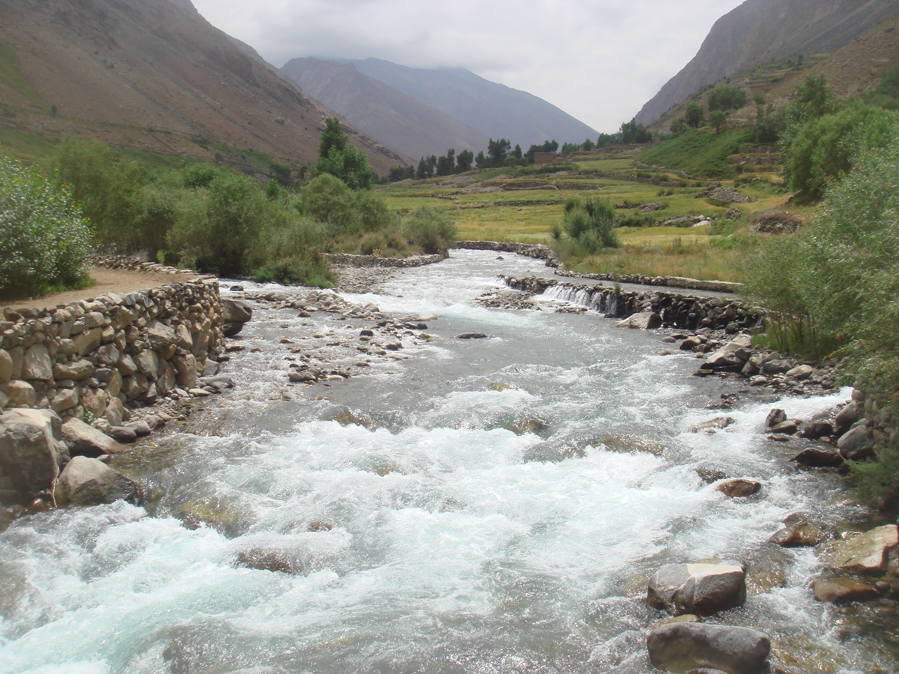 دریای خروشان و طبیعت سرسبز ولسوالی ورسج